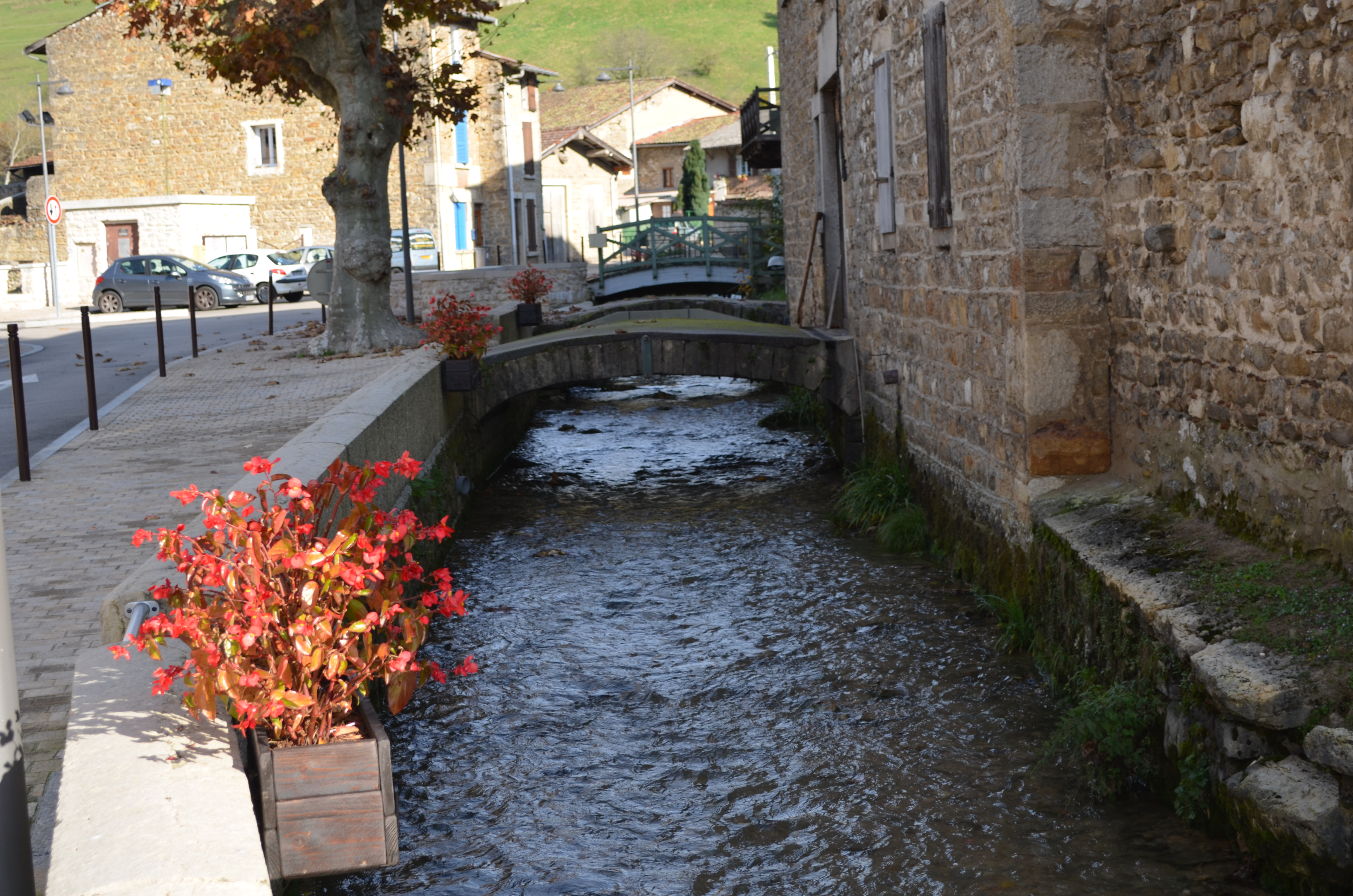 Photographie de Vaux-en-Bugey, Ain, France.